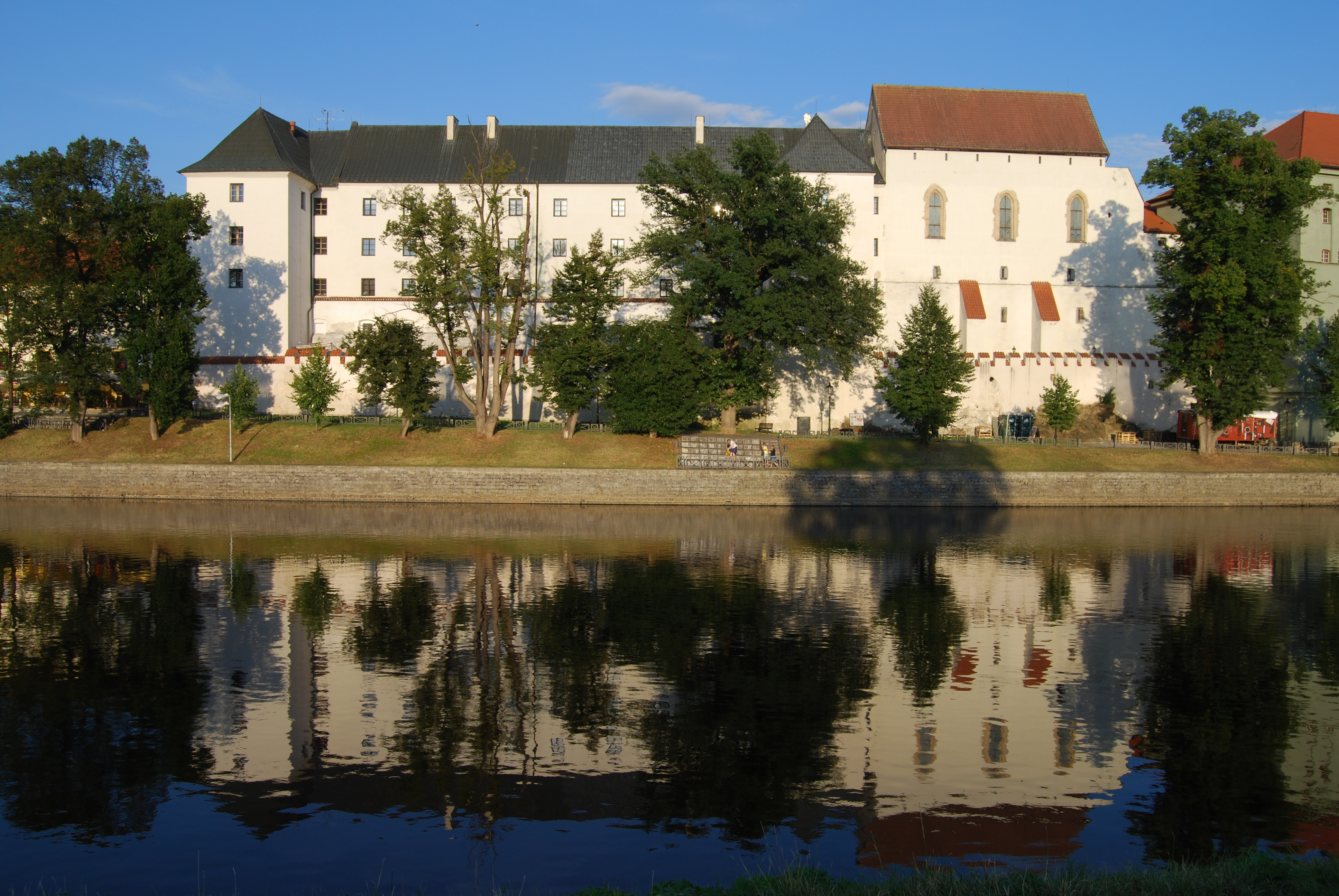 Česky: Pohled na hrad z Svatotrojické ulice. Písek. Jihočeský kraj. Česká republika. - OpenStreetMap(Info)